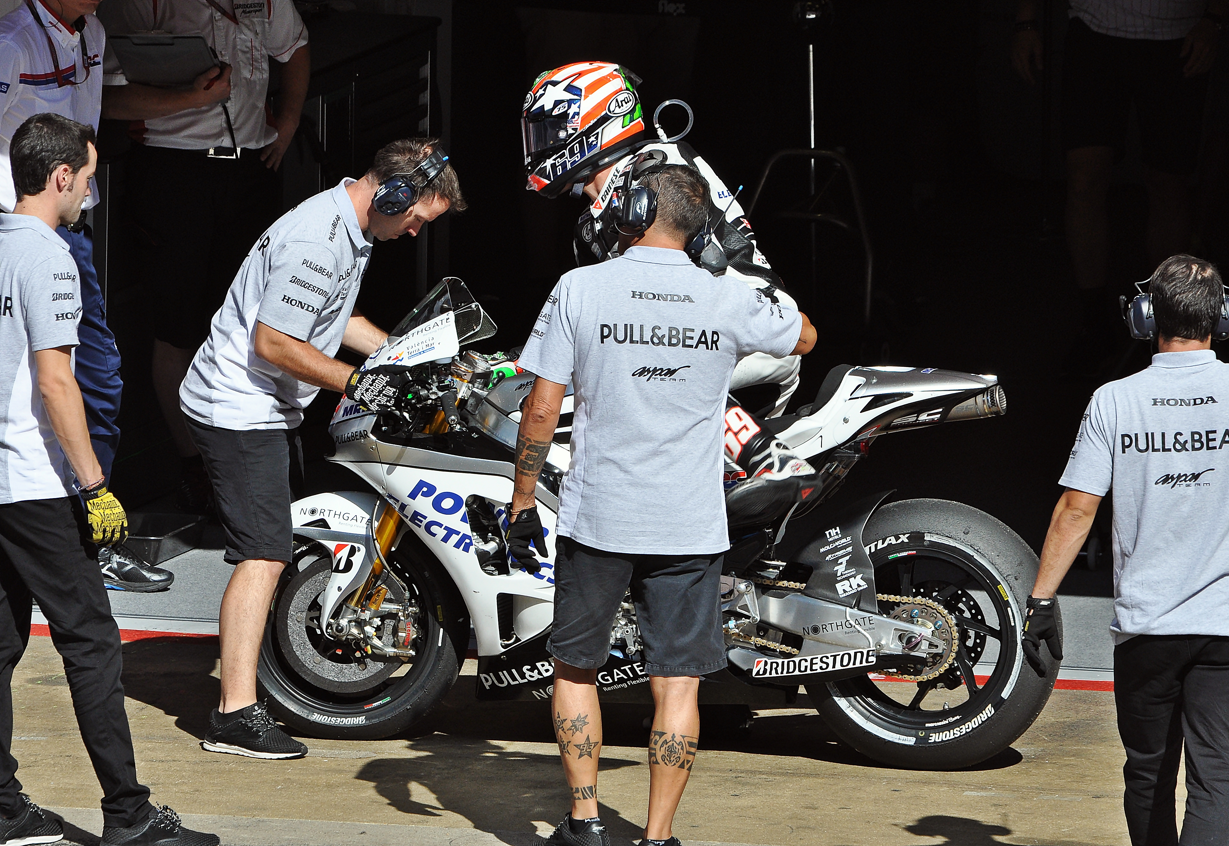 gran premio de cataluña